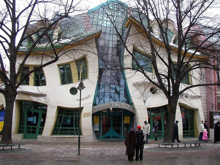 Sopot